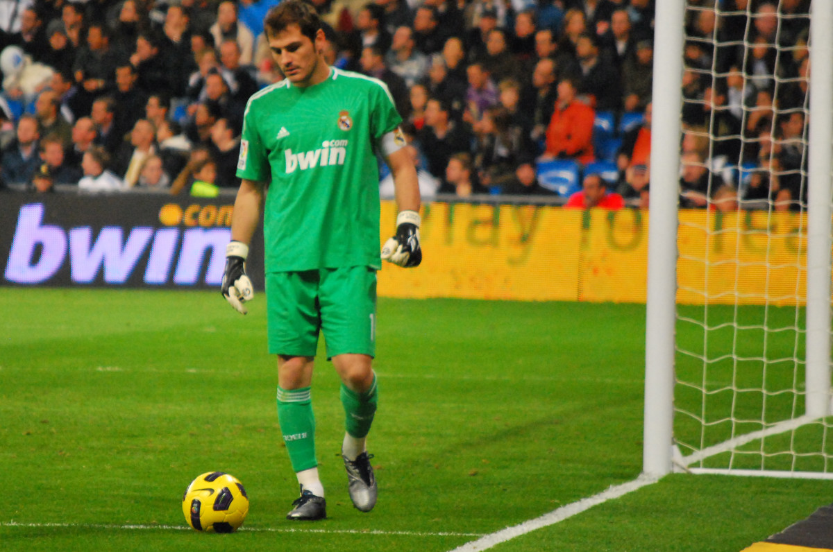 La Liga: Real Madrid 2 - Atletico 0 7 de Noviembre 2010